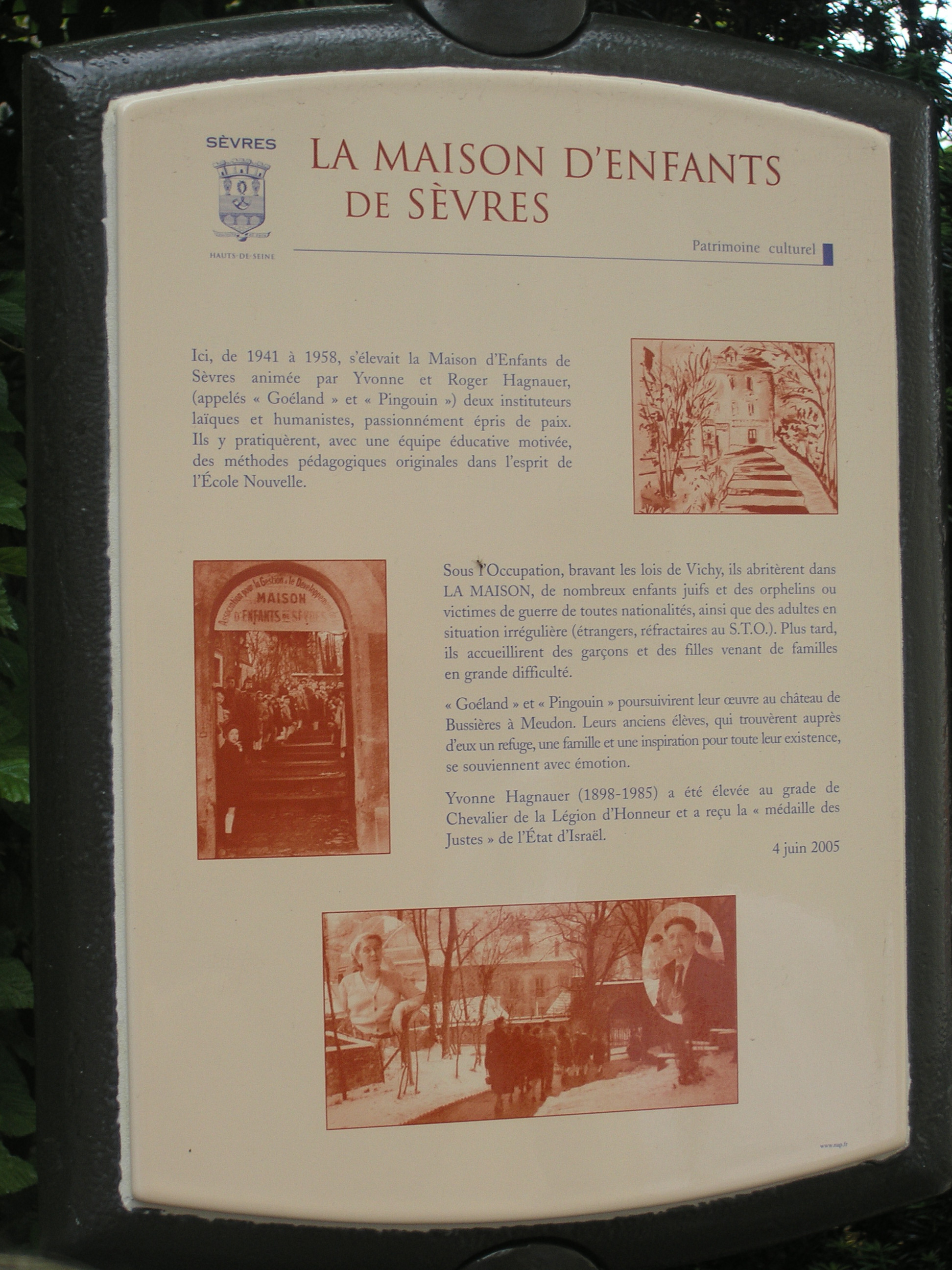 Plaque commémorative comportant trois photos ou dessins de la Maison et un texte collectif